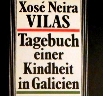 Detail of: "Tagebuch einer Kindheit in Galicien. ... Ich möchte in die weite Welt gehen. Über die Meere fahren und all die Länder, die ich nicht kenne, durchqueren. Ich bin im Dorf geboren und aufgewachsen, aber jetzt kommt es mir klein vor und eng. Als lebte ich in einem Bienenkorb. Alle möglichen Gedanken schwirren mir durch den Kopf, von denen ich niemandem erzählen kann. Die Gustav Kiepenheuer Bücherei."